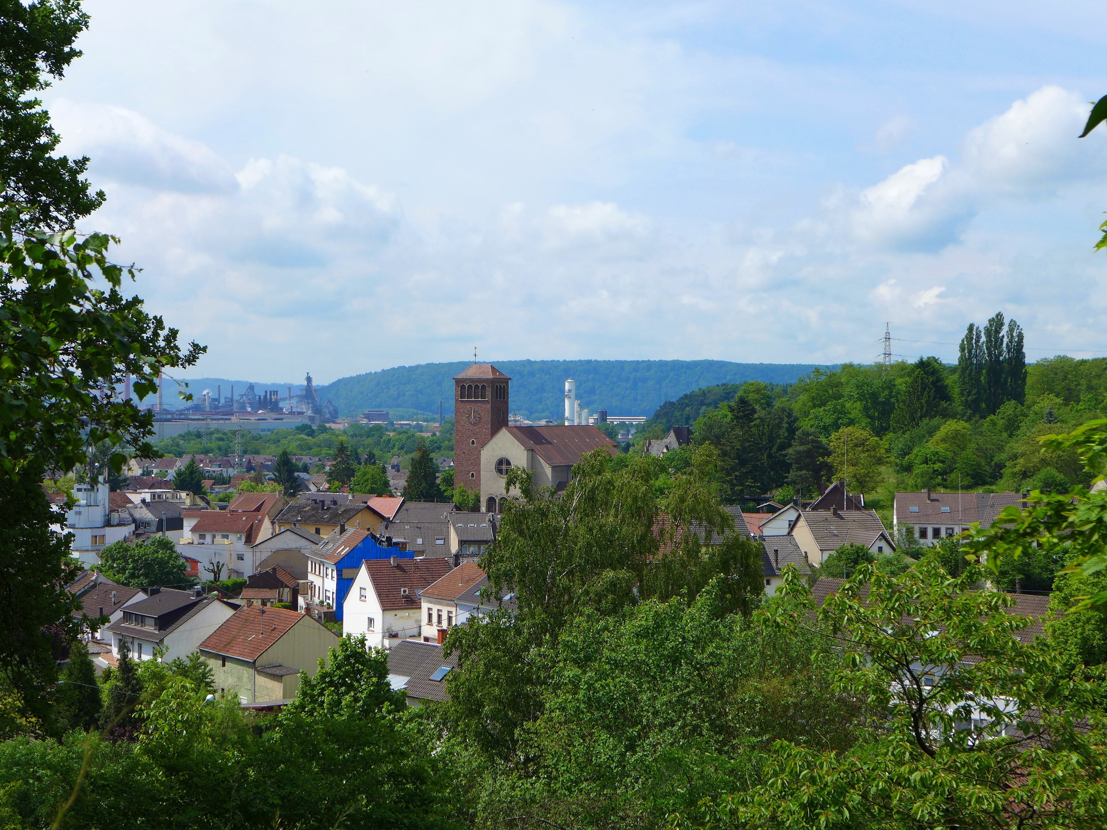 Diefflen, Blick auf die Ortsmitte mit der Kirche St. Josef und St. Wendelin, links die Dillinger Hütte, dahinter die Sendemasten der Sendeanlage Felsberg-Berus (Europe 1), im Hintergrund der Limberg am jenseitigen Saarufer